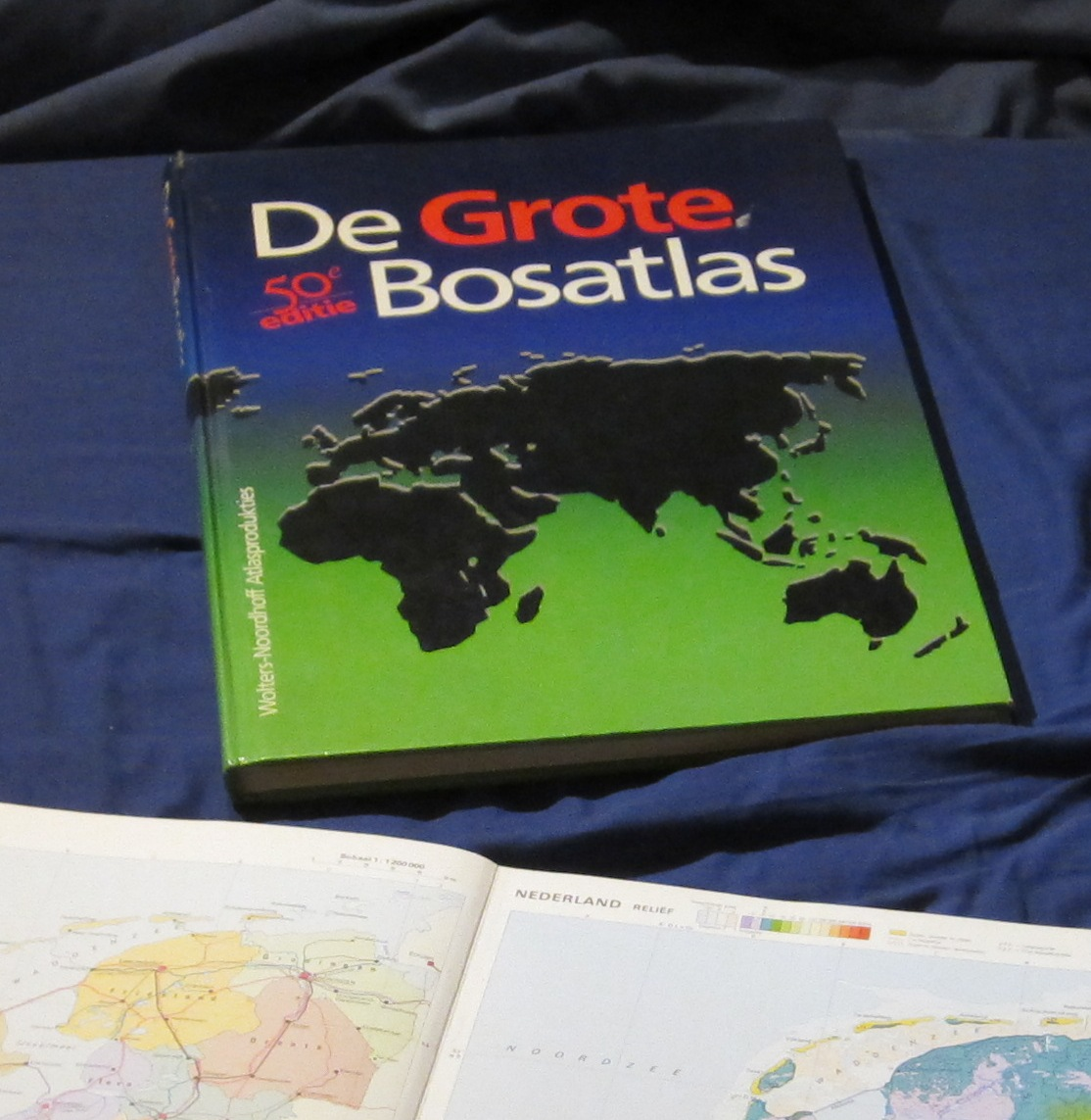 Atlas Pays Bas